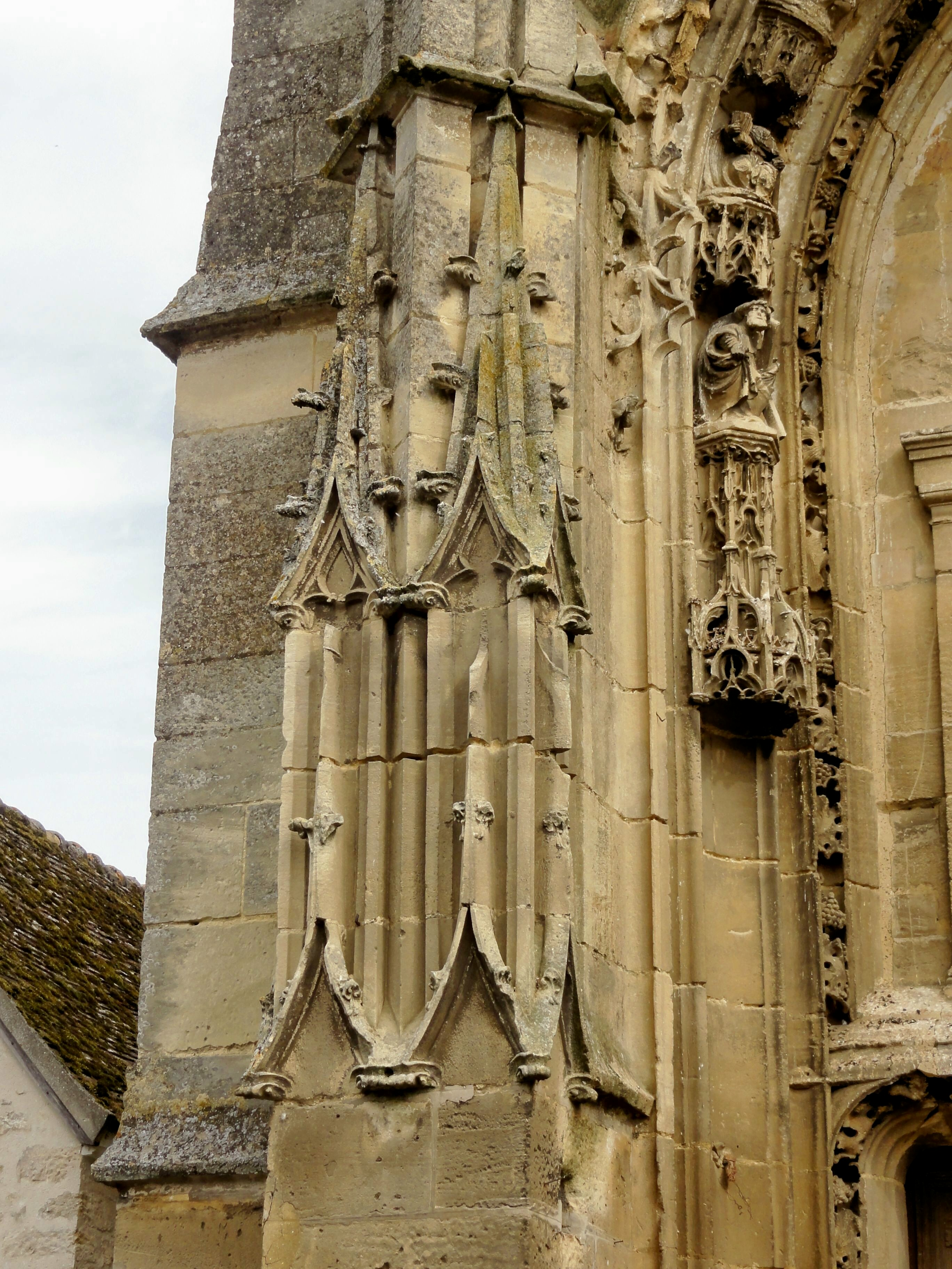 Pinacles plaqués sur le contrefort de gauche du portail.